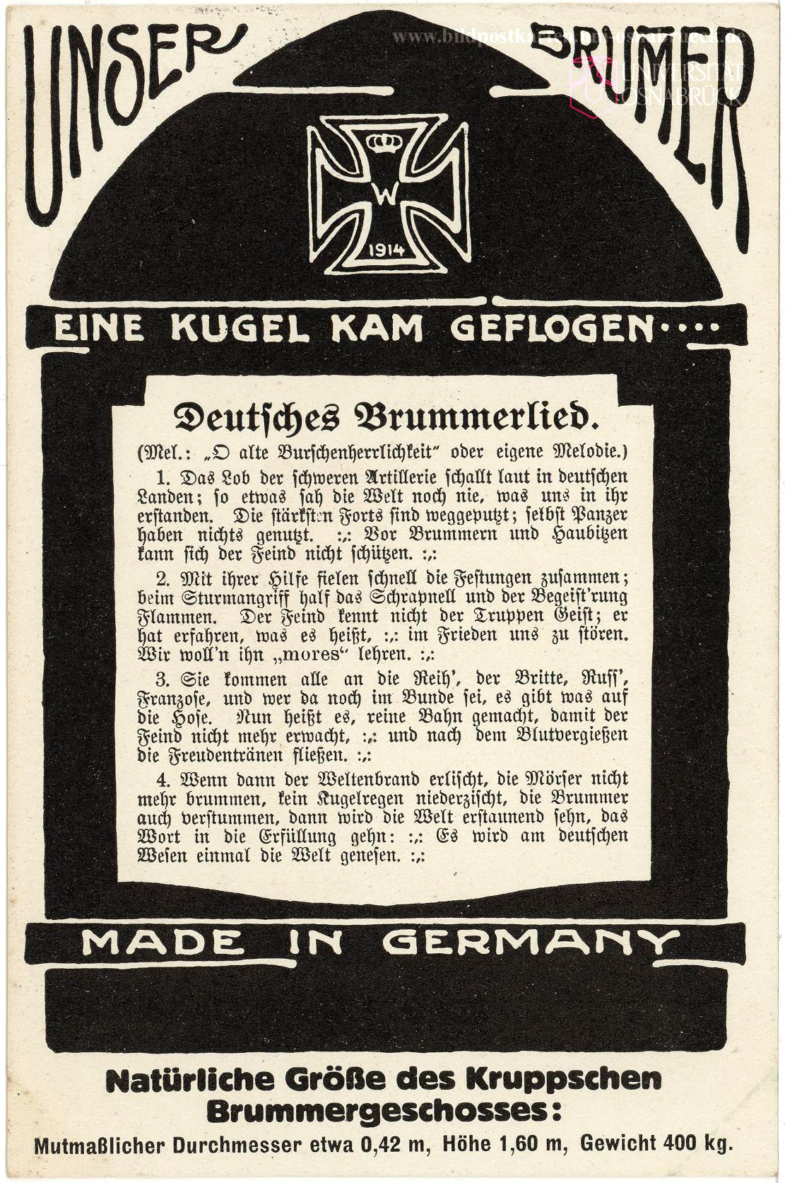 Diese - schlimme - Postkarte aus dem Verlag von Fritz Thörner ...